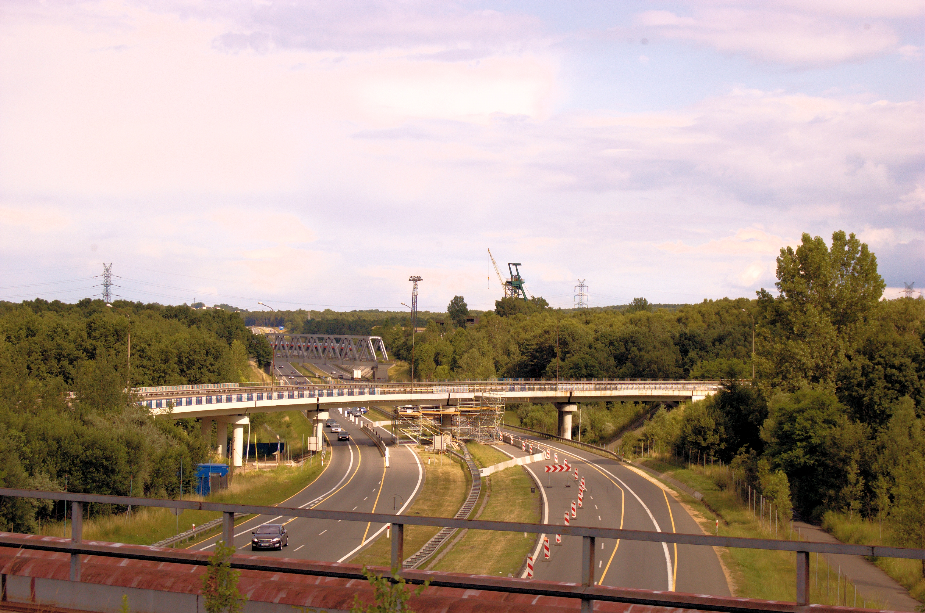 Autostrada A4 - widok drogi pomiędzy Nikiszowcem a Giszowcem: widoczny most drogowy (ul. Szopienicka) i most kolejowy